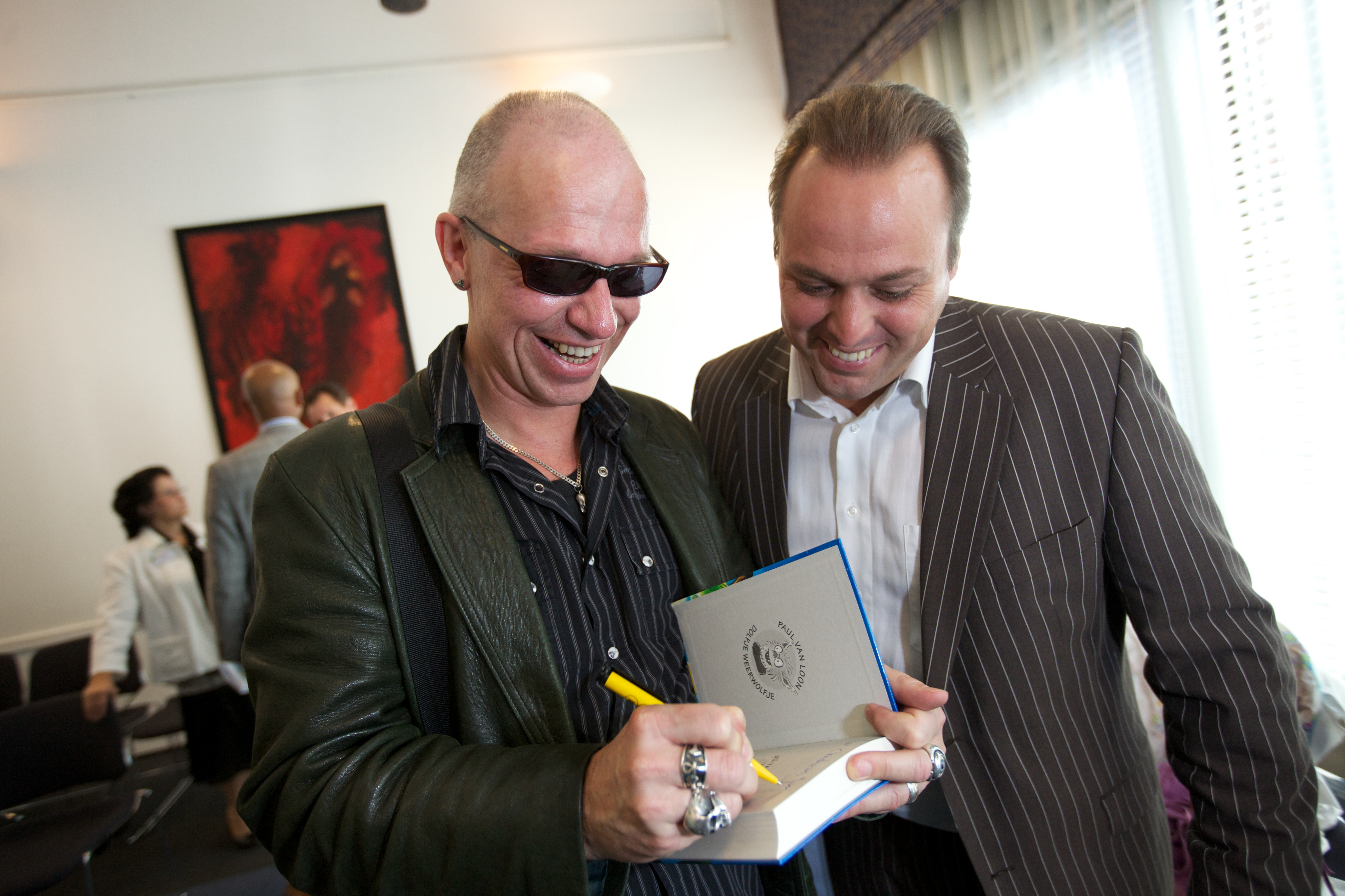 Paul van Loon signeert een boek voor Frans Bauer bij de lancering van de website U Aan Zet